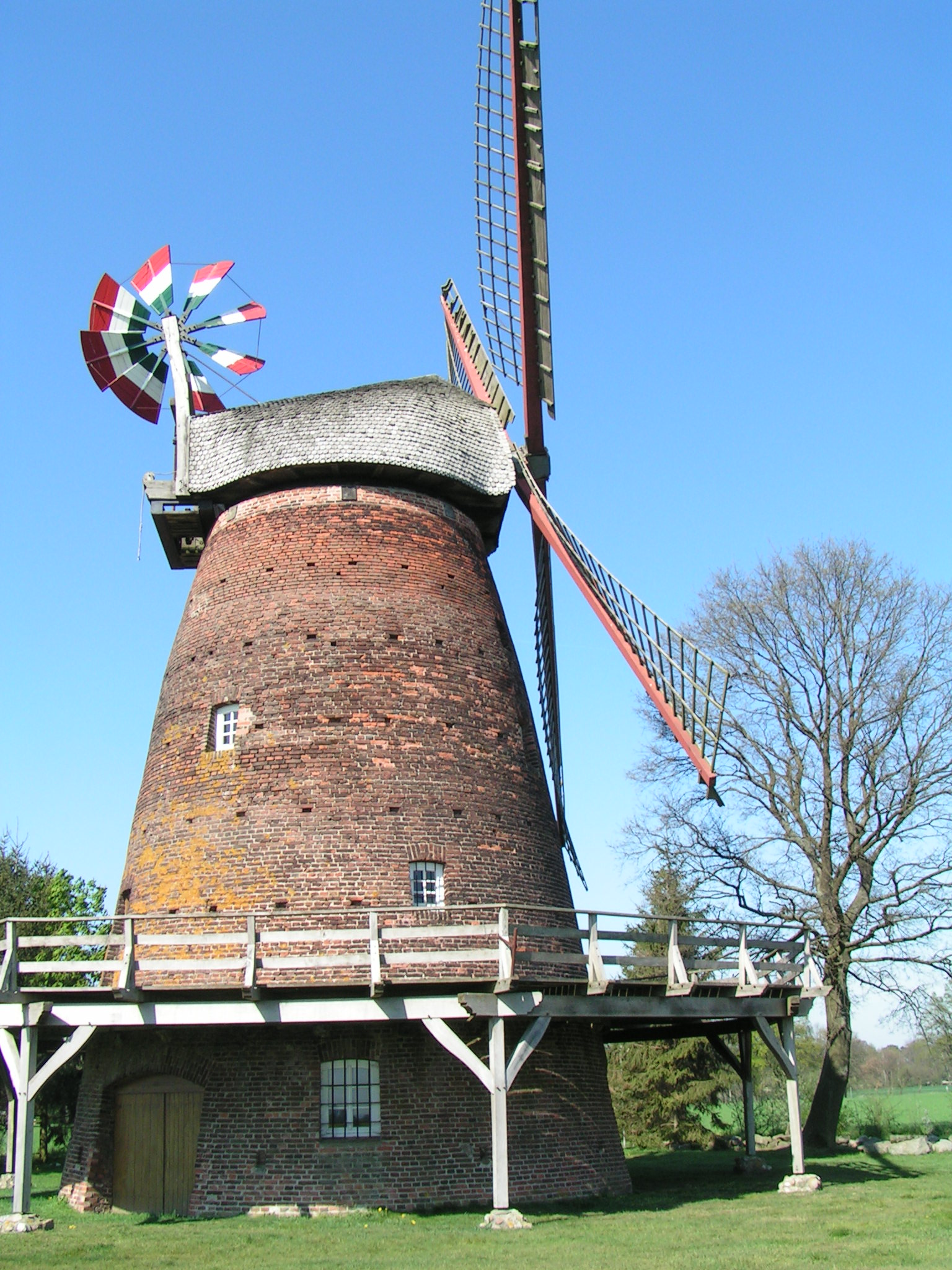 Windmühle Hoyersvörde (Gemeinde Warmsen, Landkreis Nienburg/Weser, Niedersachsen)